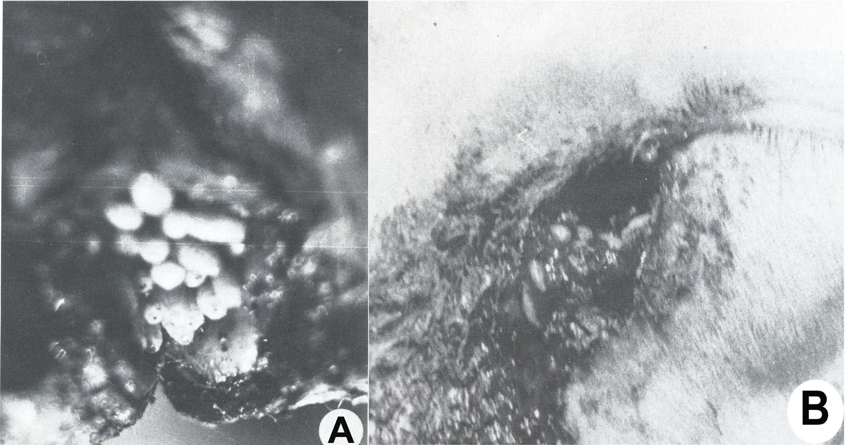 Fig. 6. Podomyiase et ophthalmomyiases des moutons.